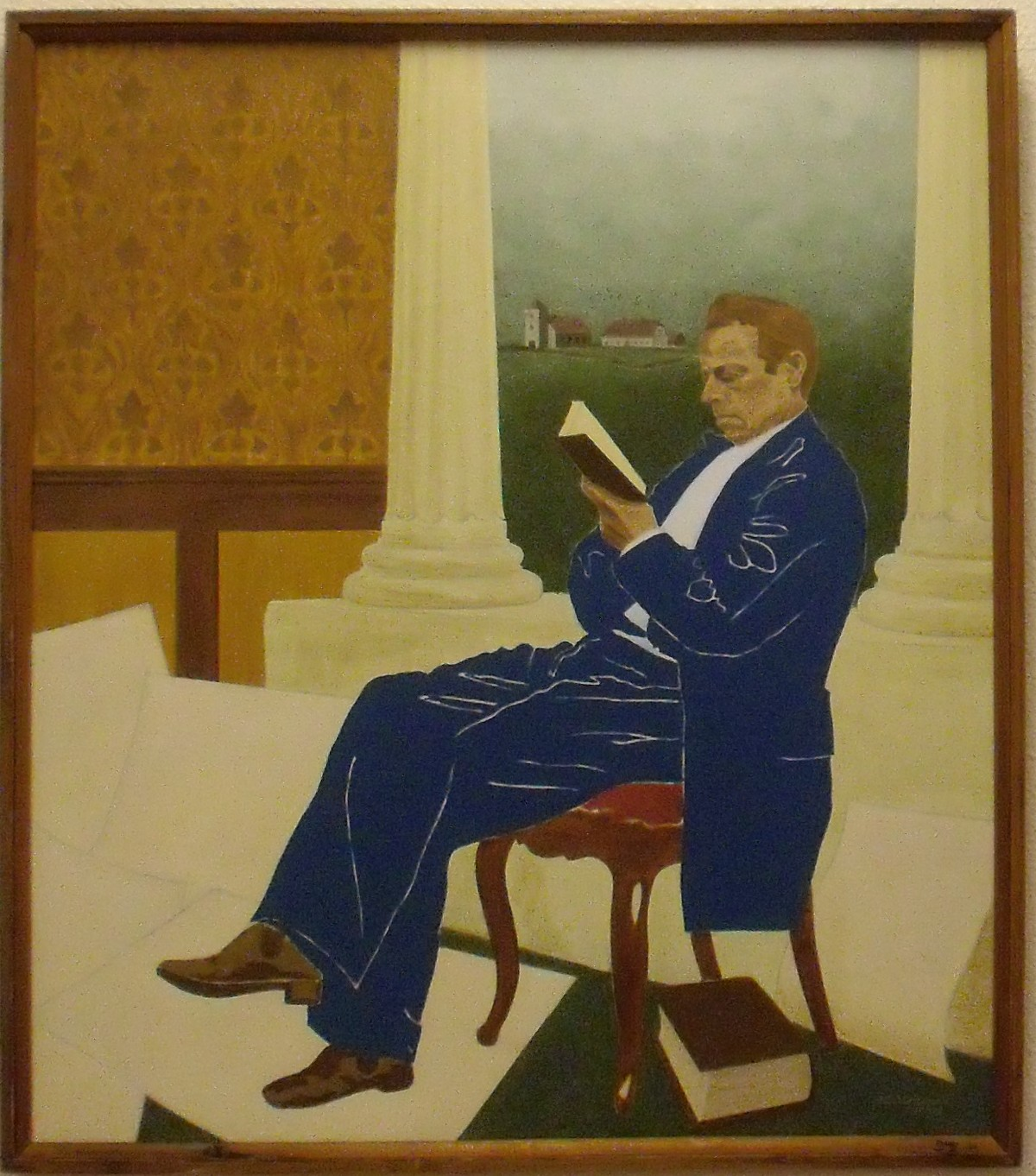 málverk af Benedikt Gröndal Sveinbjarnarsyni eftir Ólaf Th Ólafsson